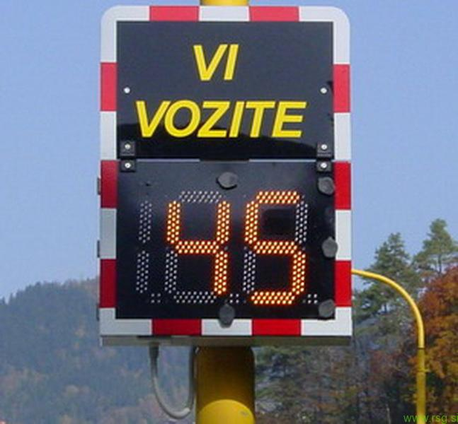 Preventivna radarska tabla